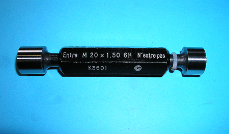 Tampon lisse double pour contrôle par calibre à limites Photo prise par/Picture taken by Romary